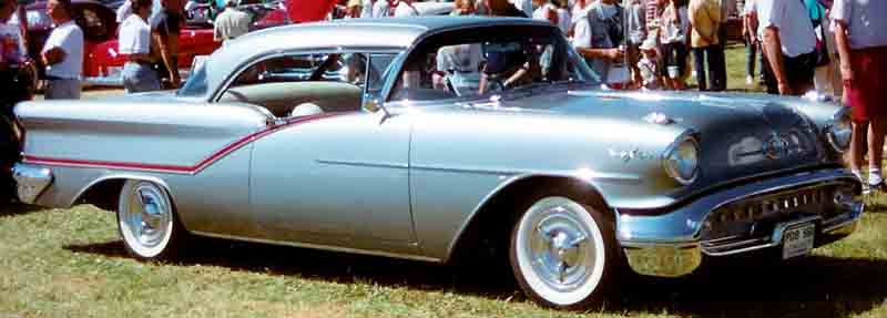 Oldsmobile 98 Coupé 1957